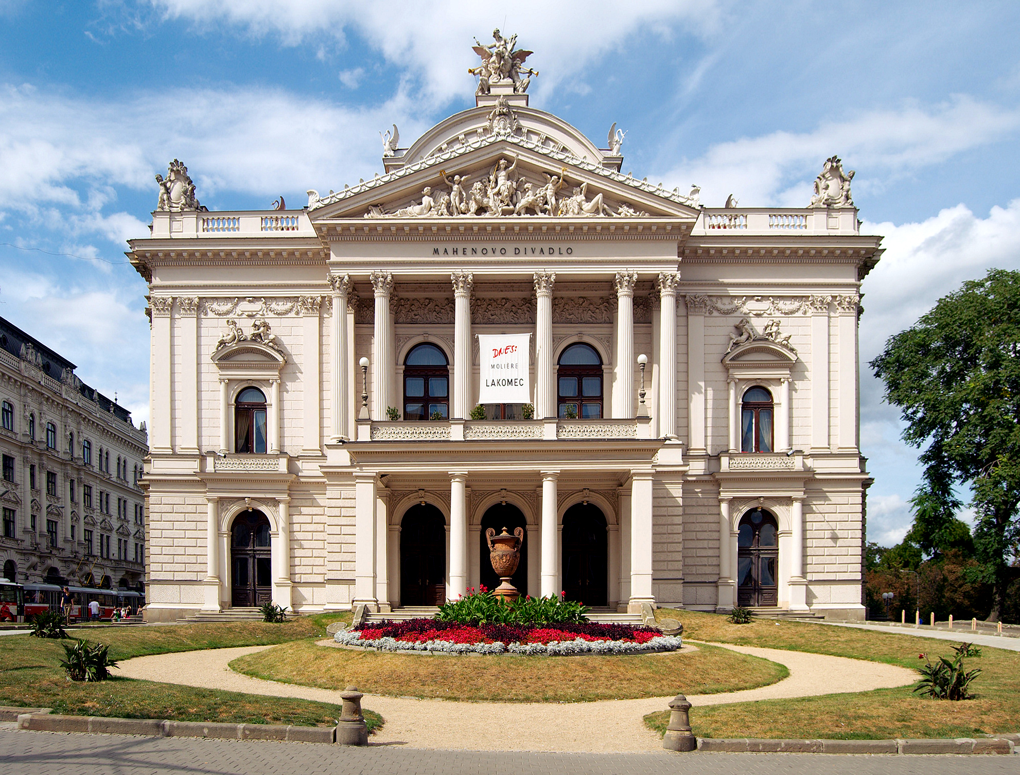 Město Brno - Mahenovo divadlo vyfotografované od jihu